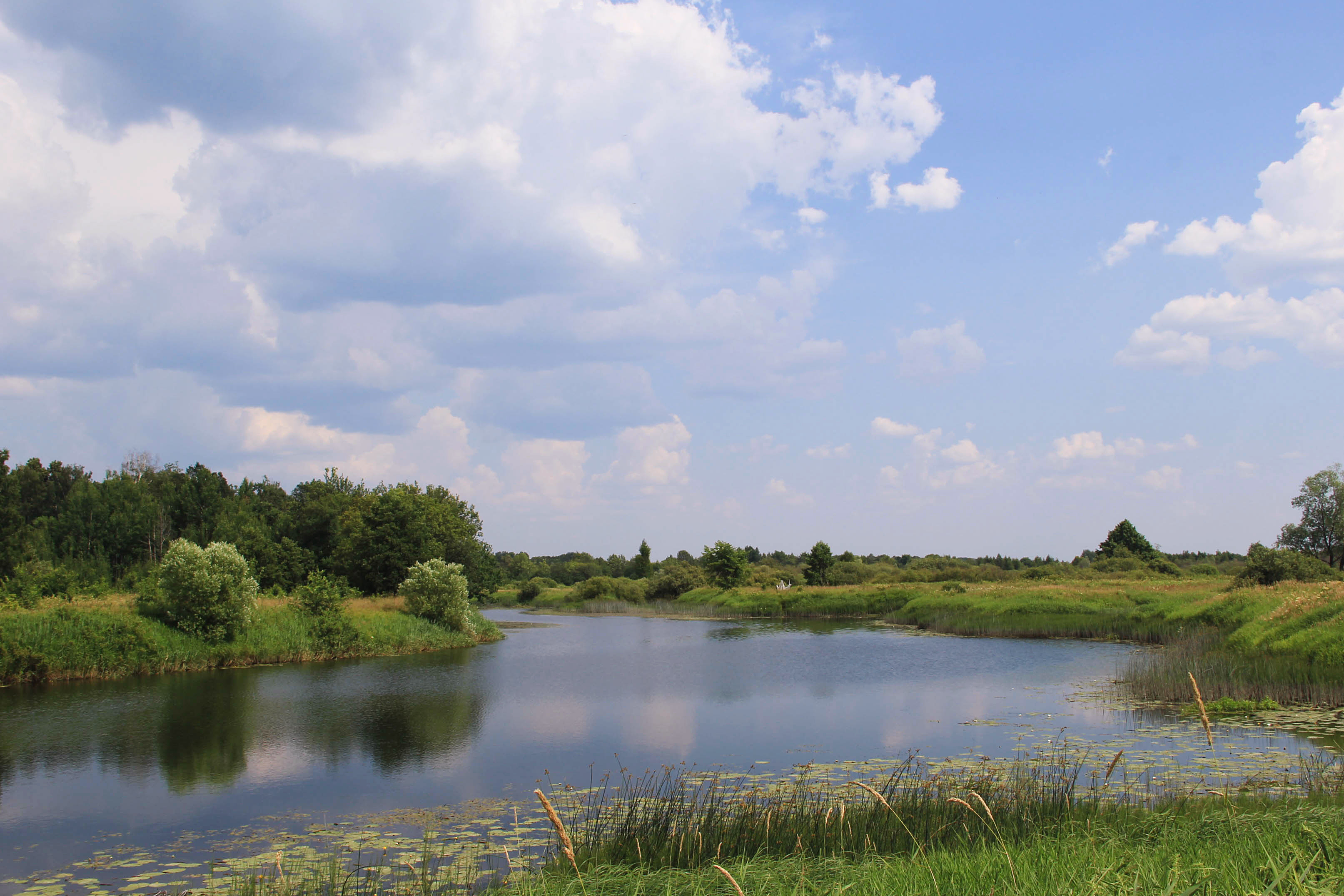 Участок леса: Находится в кв. 63, 64 Комсомольского лесничества Зубовского лесхоза, Зубово-Полянский район, Мордовия This image is related to the protected area of Russia number 1320056